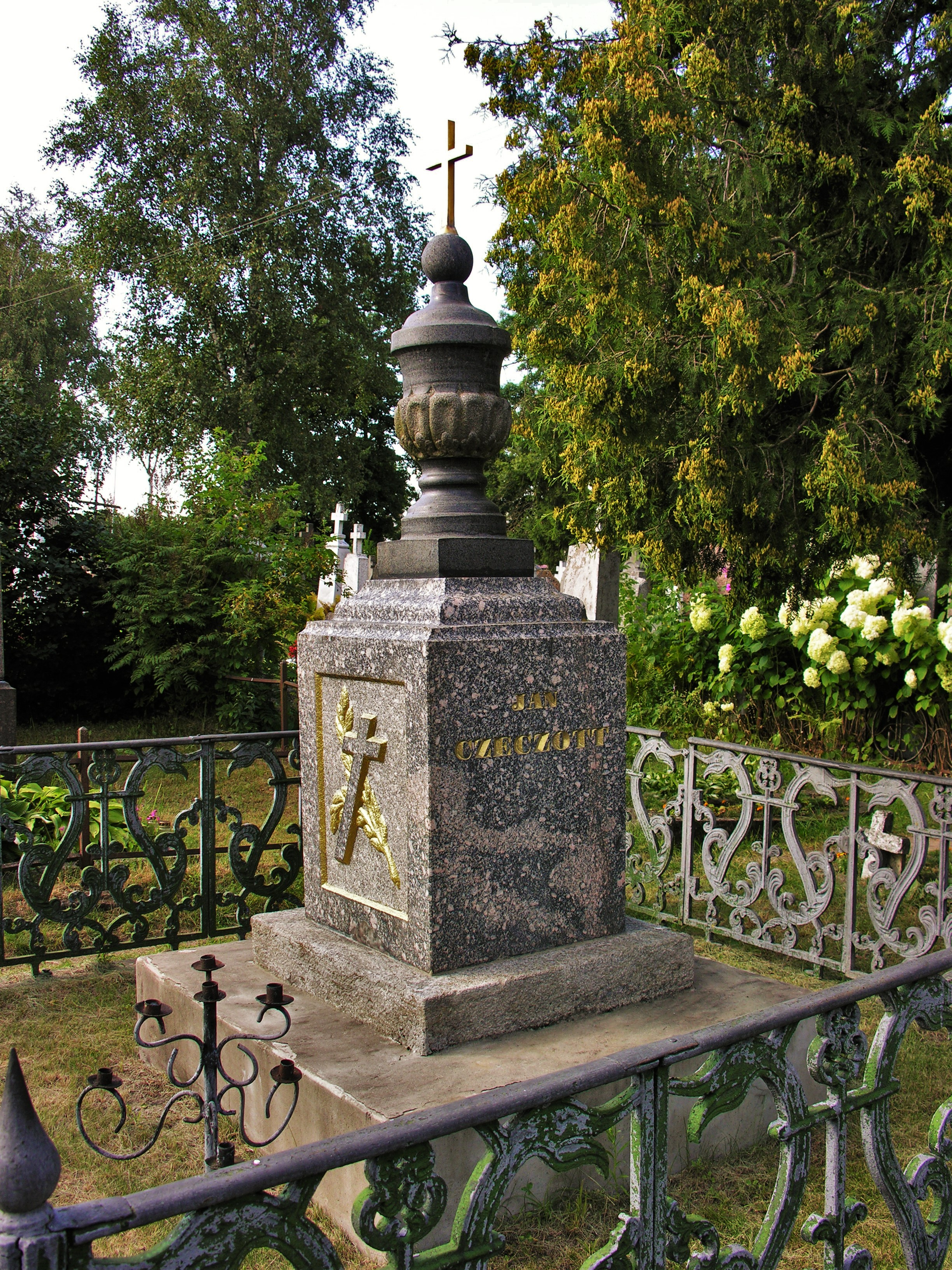 Grób Jana Czeczota w Ratnicy.